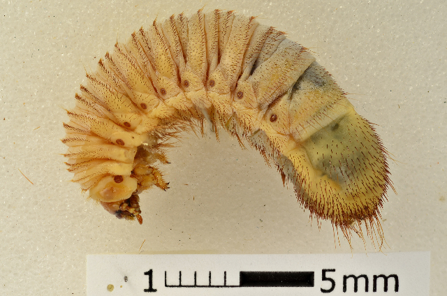 Chlorobapta frontalis larva, MIC60548-006